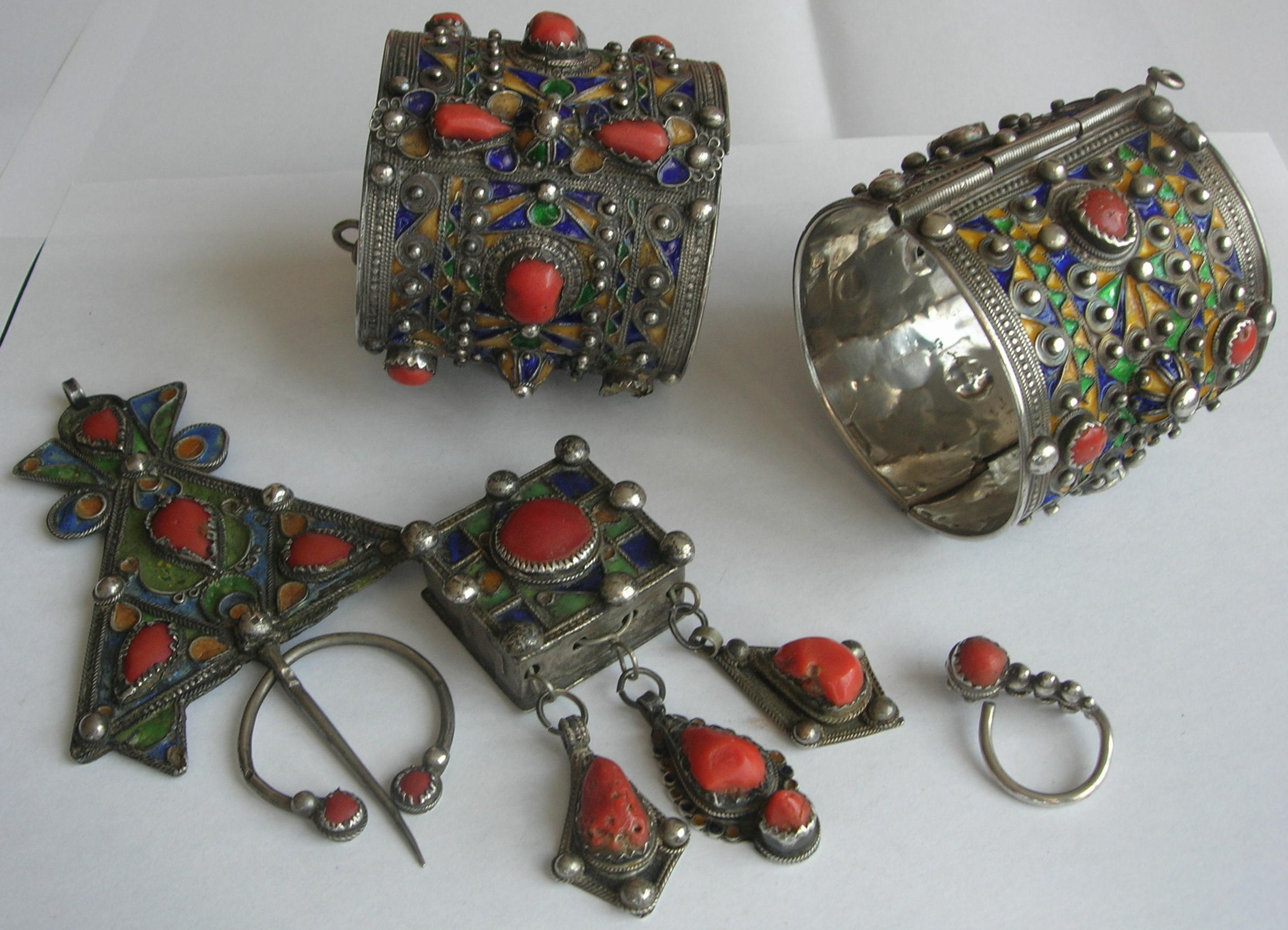 Bijoux traditionnels de Kabylie, Algérie (milieu du XXème siècle)